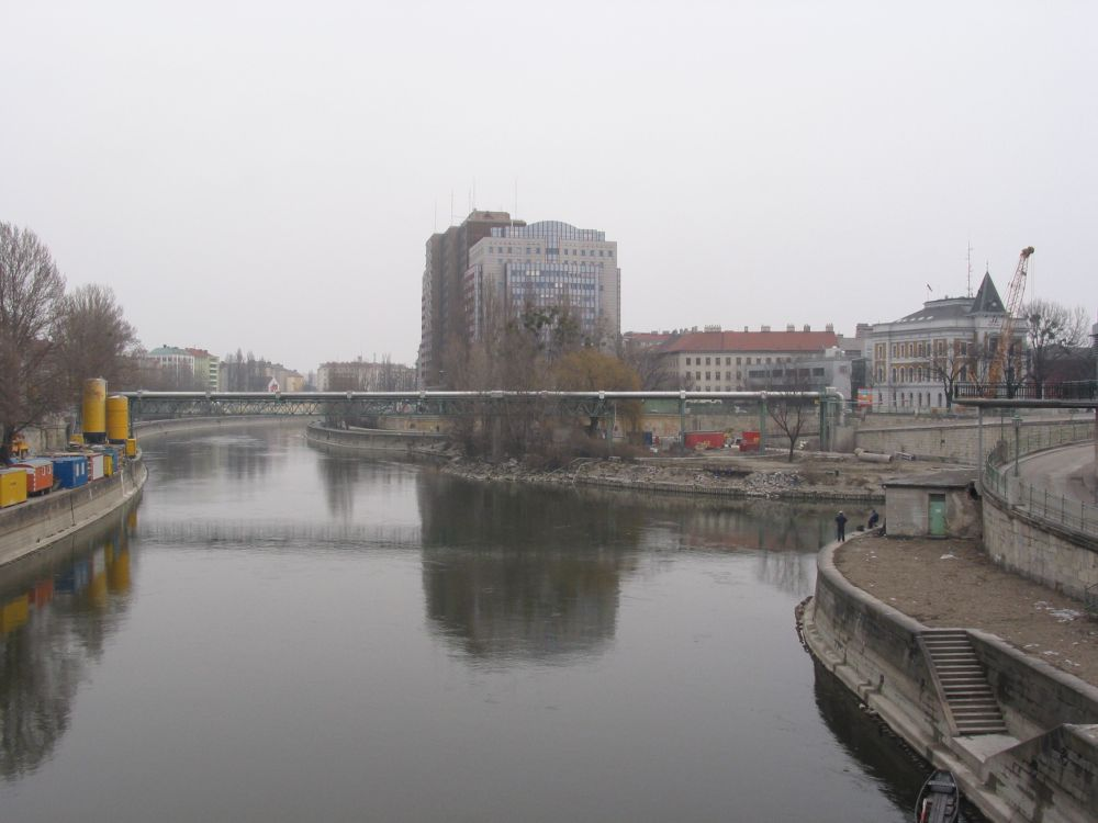 provisional pipe bridge over Donaukanal, Vienna, 2004-03-14 selfmade photo